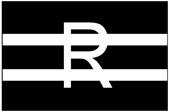 Flag of "Freikorps Roßbach", 1919